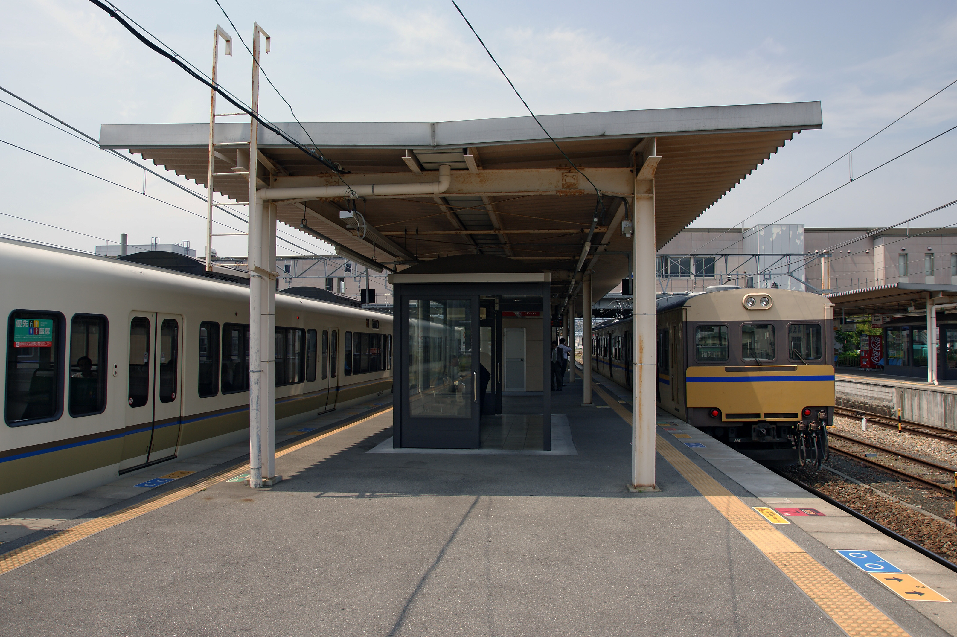 Sasayamaguchi Station in Sasayama, Hyogo prefecture, Japan